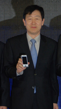 삼성전자 T 옴니아 신제품 발표회